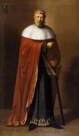 Retrato imaginario del rey Ramiro I de Aragón († 1063), que fue hijo del rey Sancho Garcés III de Pamplona y de Sancha de Aibar.